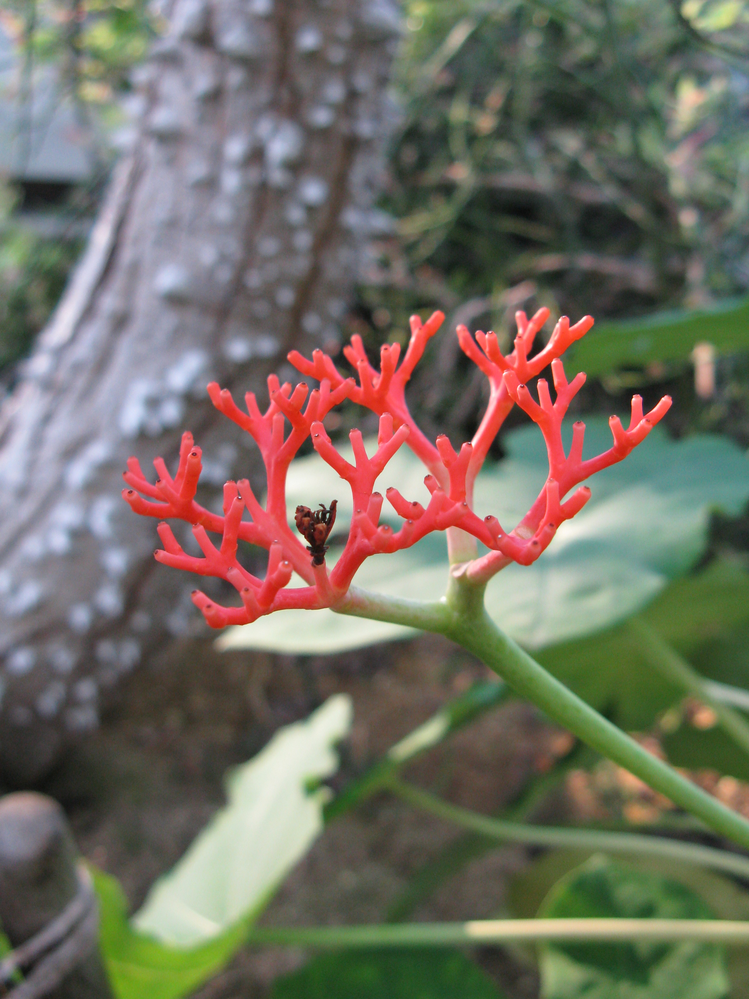 Jatropha podagrica